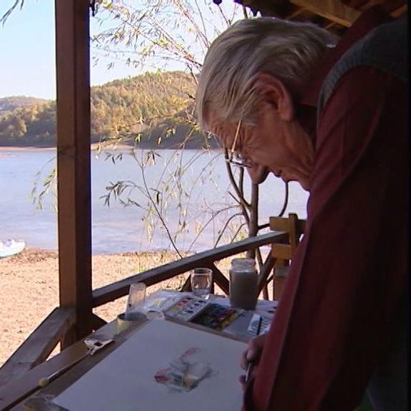 Veli Gervalla